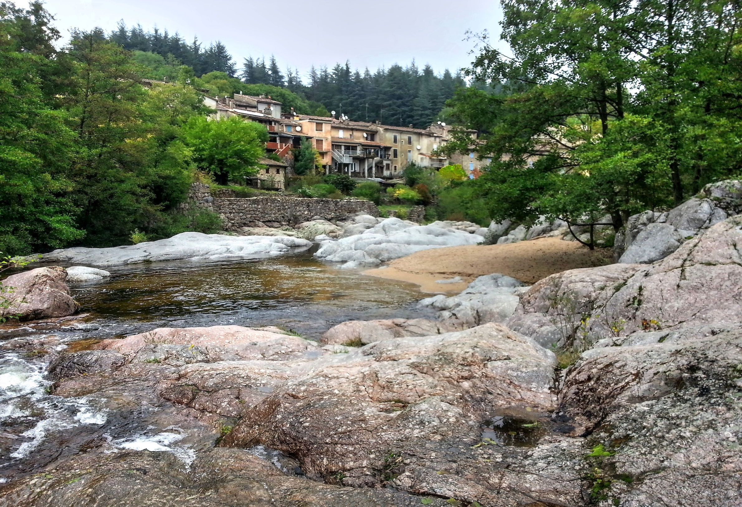 riviére la Salindrenque